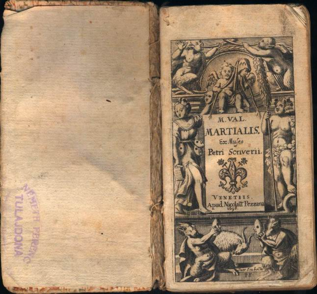 Martialis szatíráinak 1698-as velencei népszerű kiadása